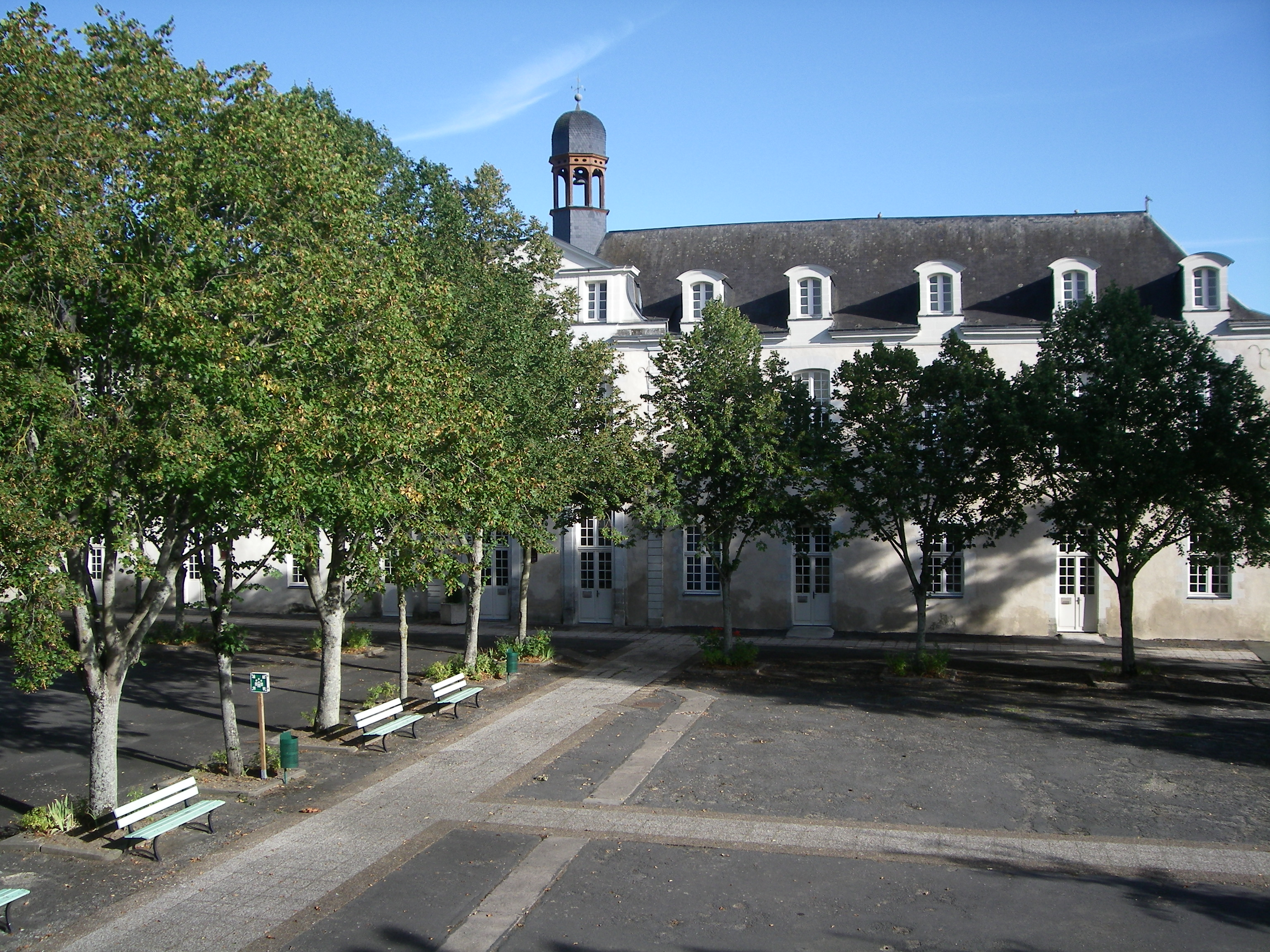 lycée Victor-Hugo Bâtiment de l'horloge, en partie classé (1735) et une partie de la cour